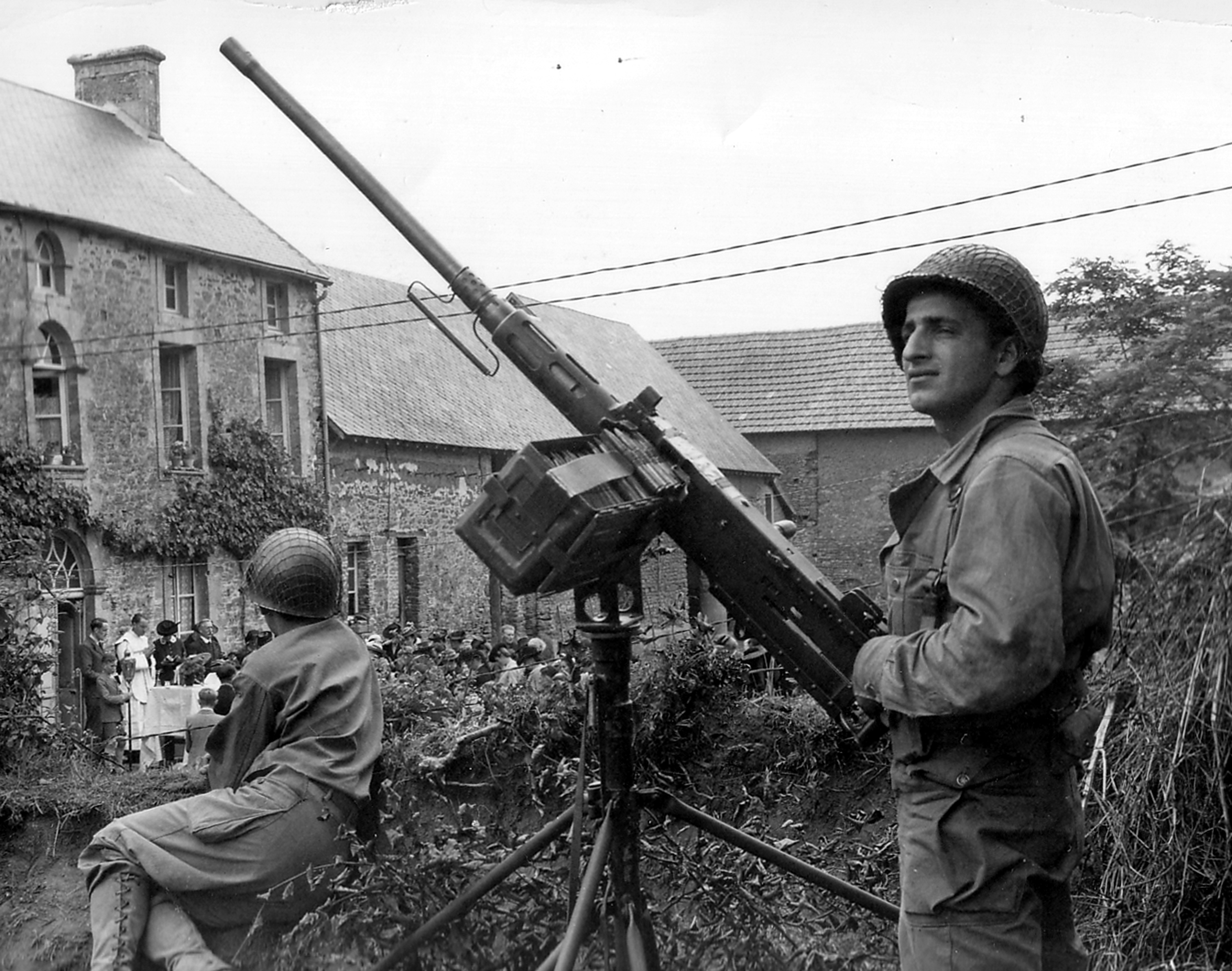 Libération de la Basse-Normandie pendant l'été 1944, en secteur américain. Une assemblée locale solennellement réunie dans la cour d'une ferme,sous la vigilance de deux GI's dont l'un à la poignée de sa mitrailleuse lourde Browning M2HB .50.